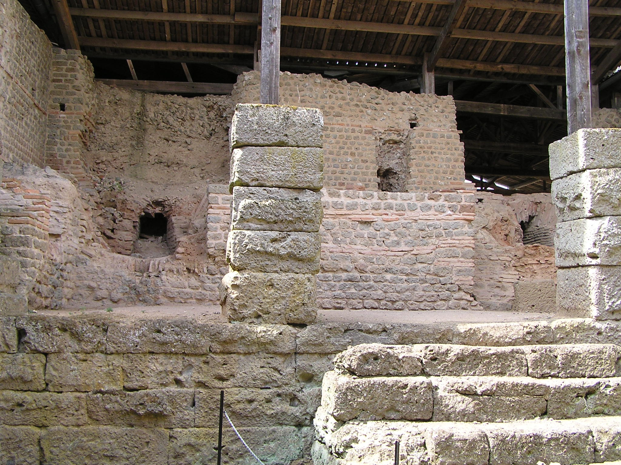 thermes de Chassenon : sous-sol, les fours